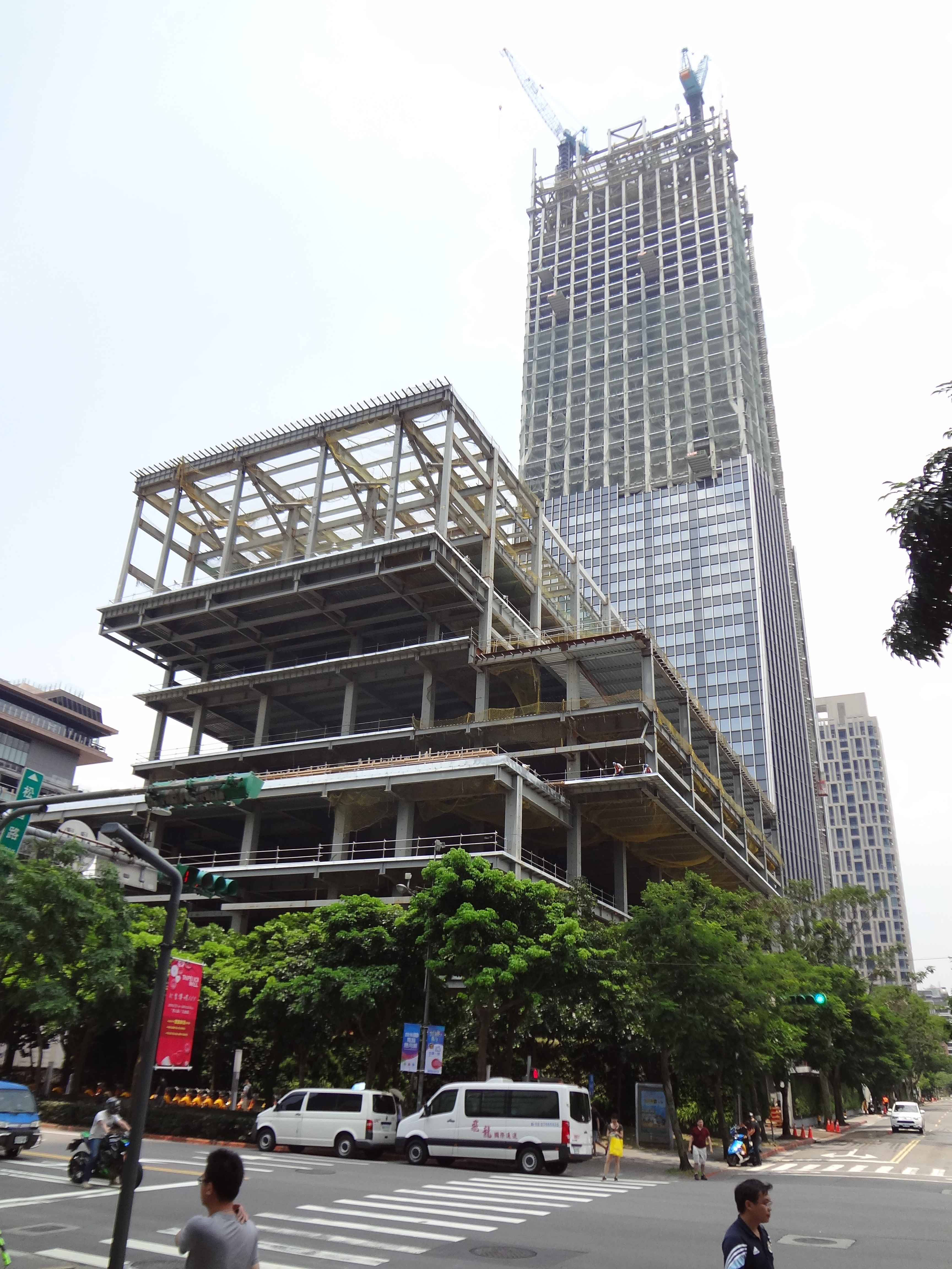 臺北南山廣場興建中。